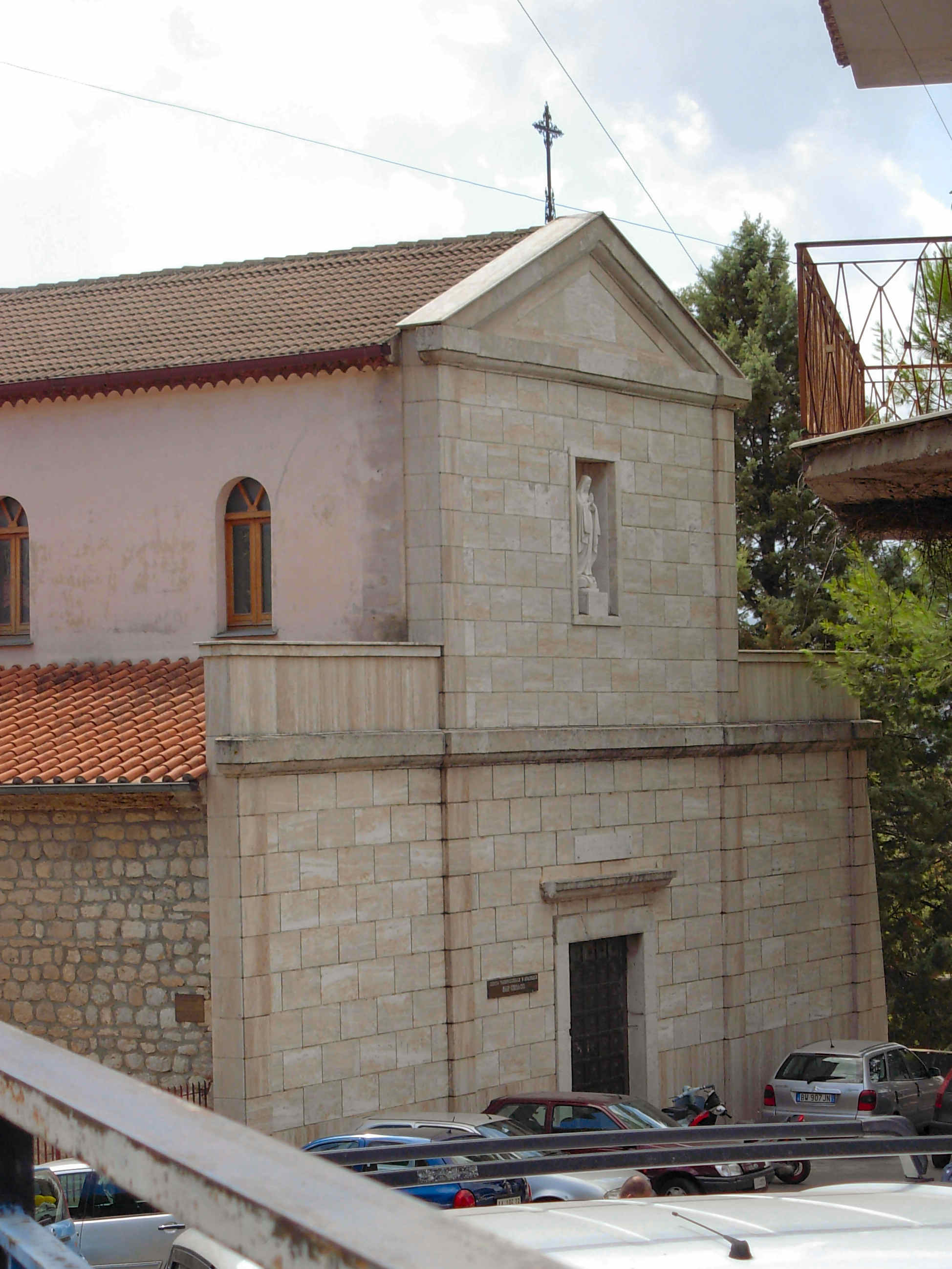 La Chiesa di San Ciriaco a Foglianise (BN), Italia